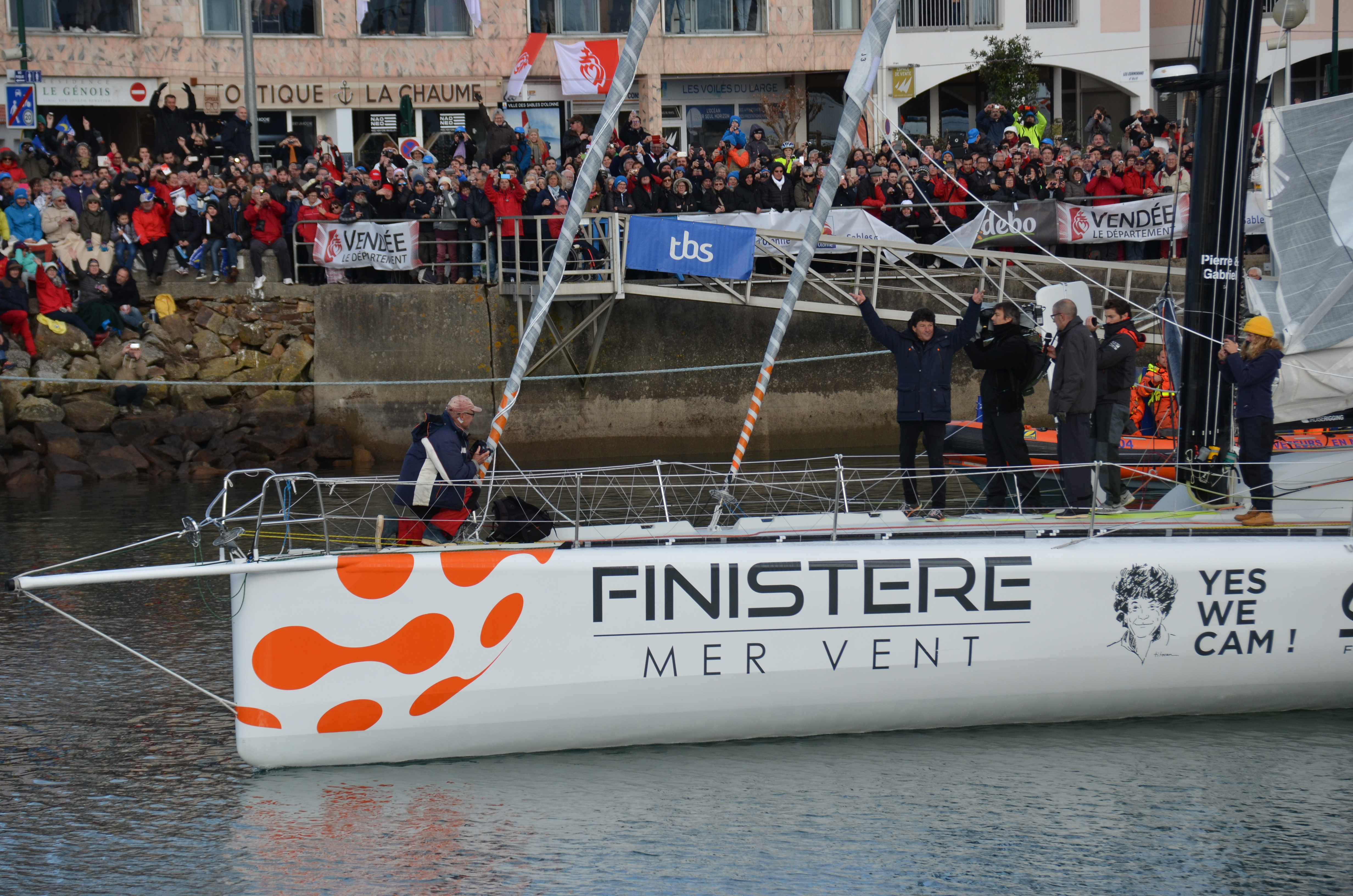 Jean Le Cam au départ du Vendée Globe 2016-2017